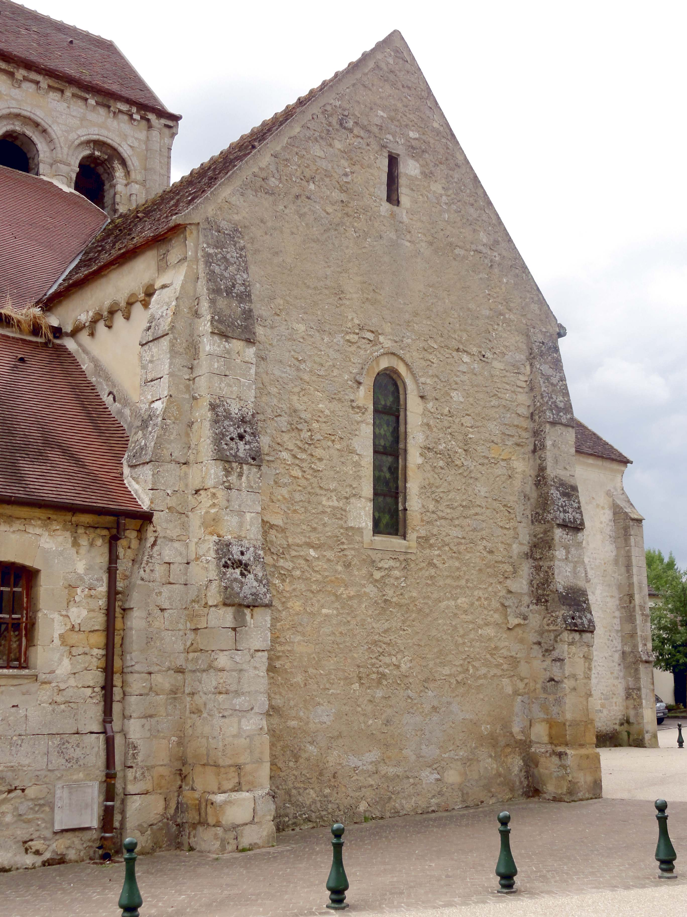 Église Saint-Sulpice de Seraincourt - voir titre.